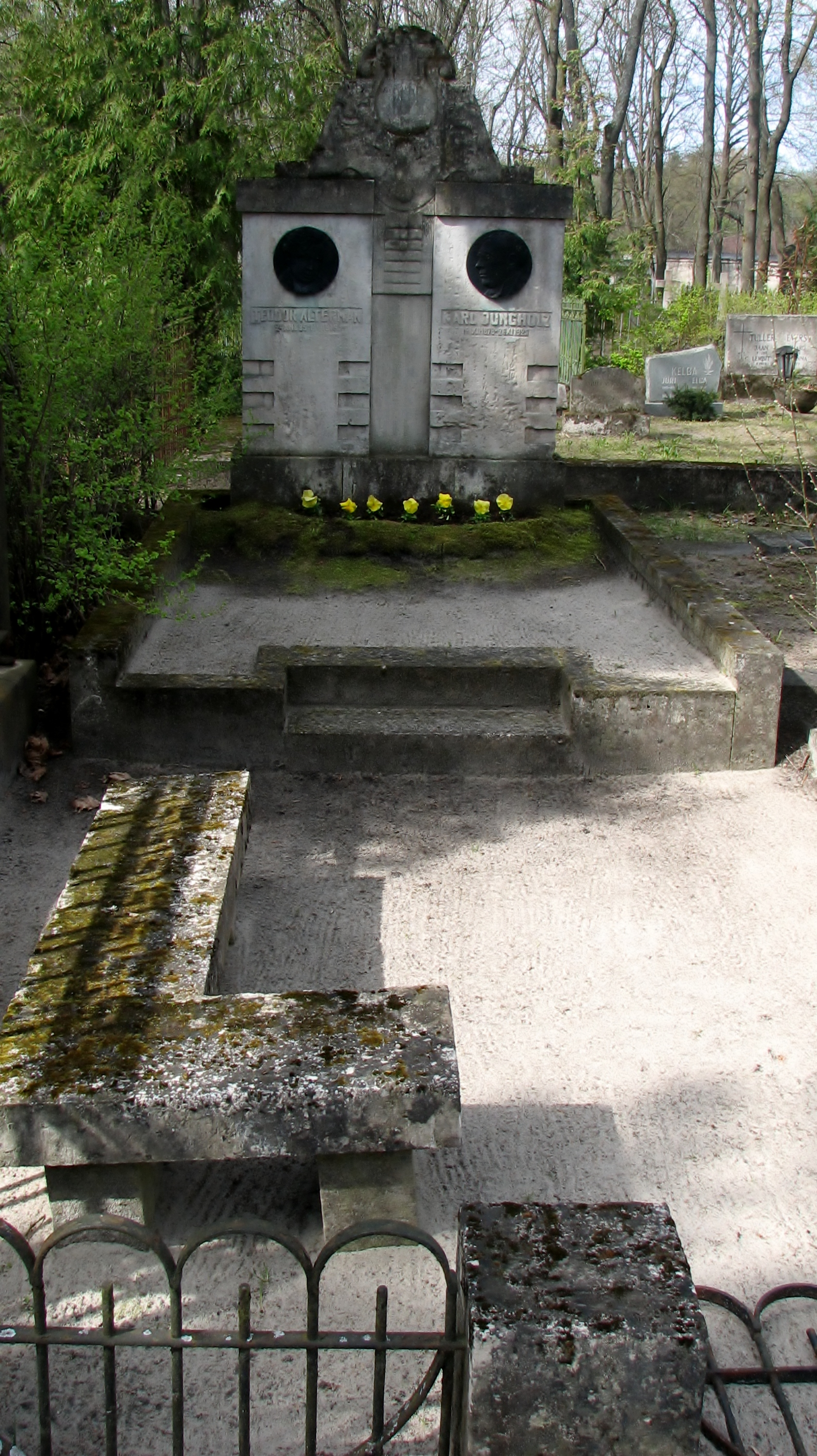 Theodor Altermanni (1885–1915) haud vasakul ja Karl Jungholzi (1878–1925) haud paremal Siselinna kalmistul